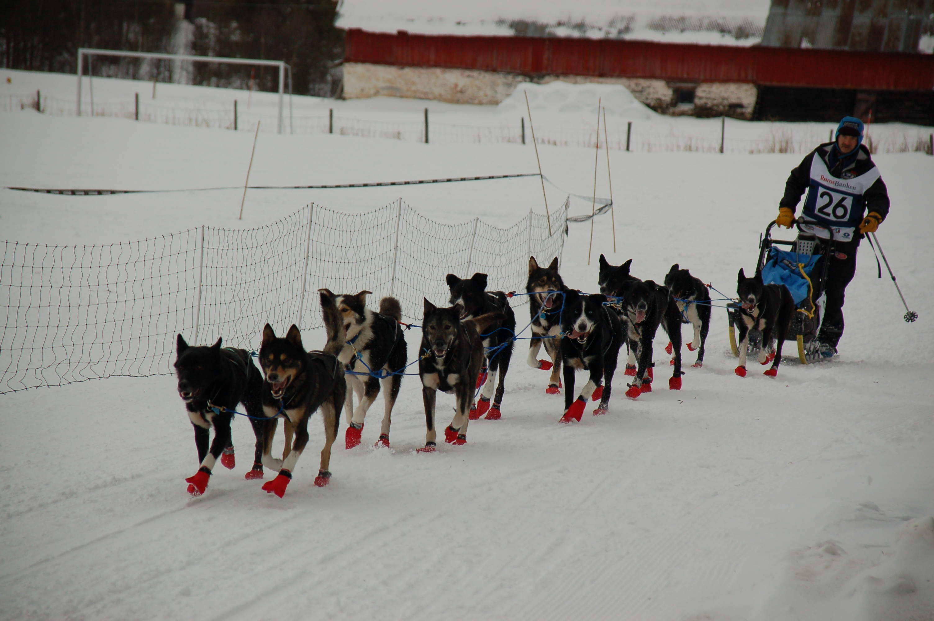 Robert Sørlie i klassen F600 inn mot sjekkpunkt Tolga på Sætersgård stadion